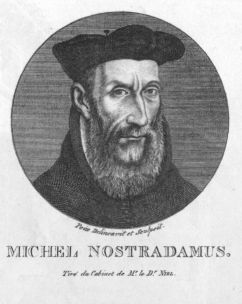 Portrait de Michel Nostradamus, par un médecin traitant, le Dr. Niel.